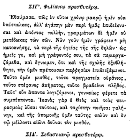 Письмо Иоанна Златоуста Филиппу Сидскому